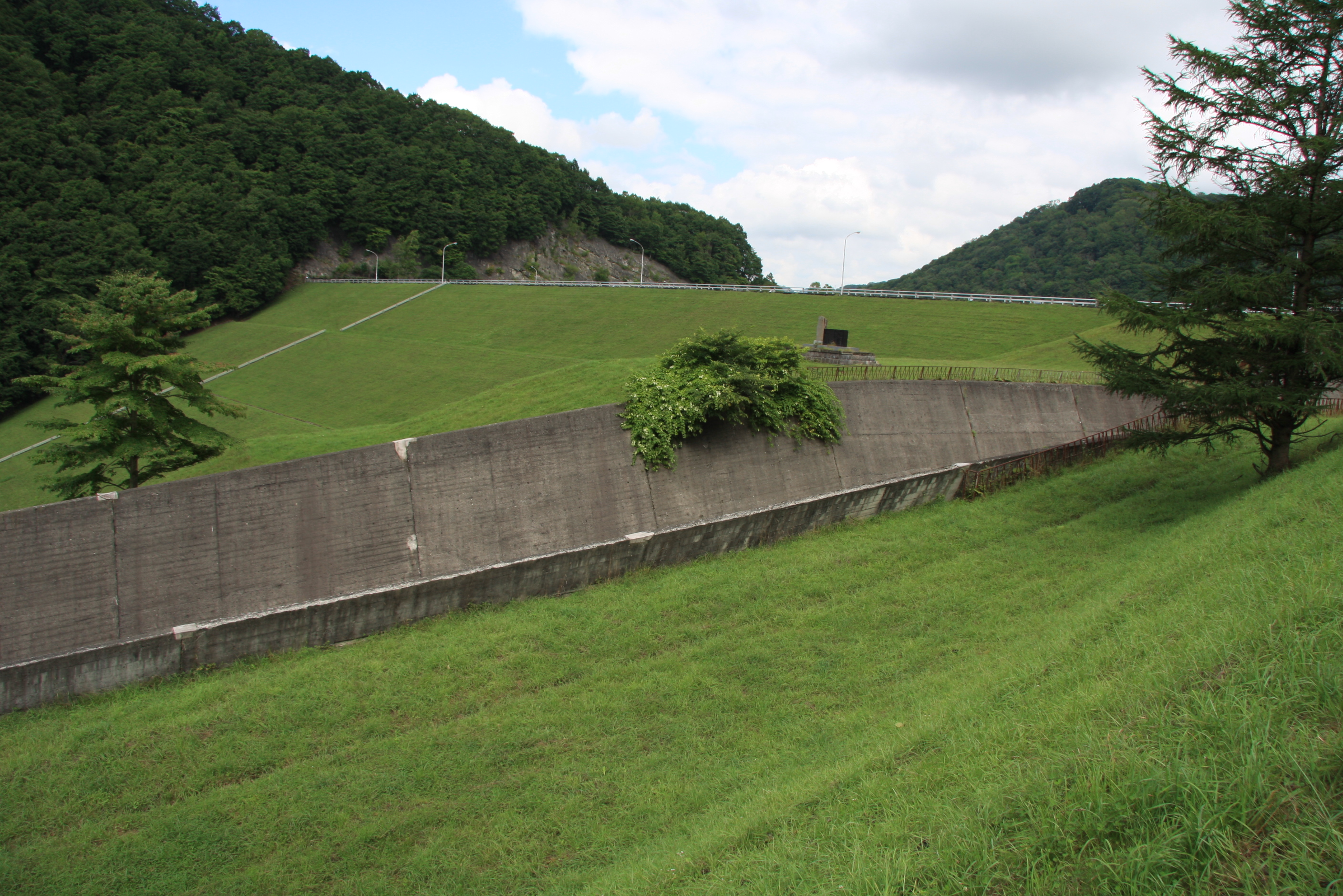 厚真ダム（厚真町幌内）